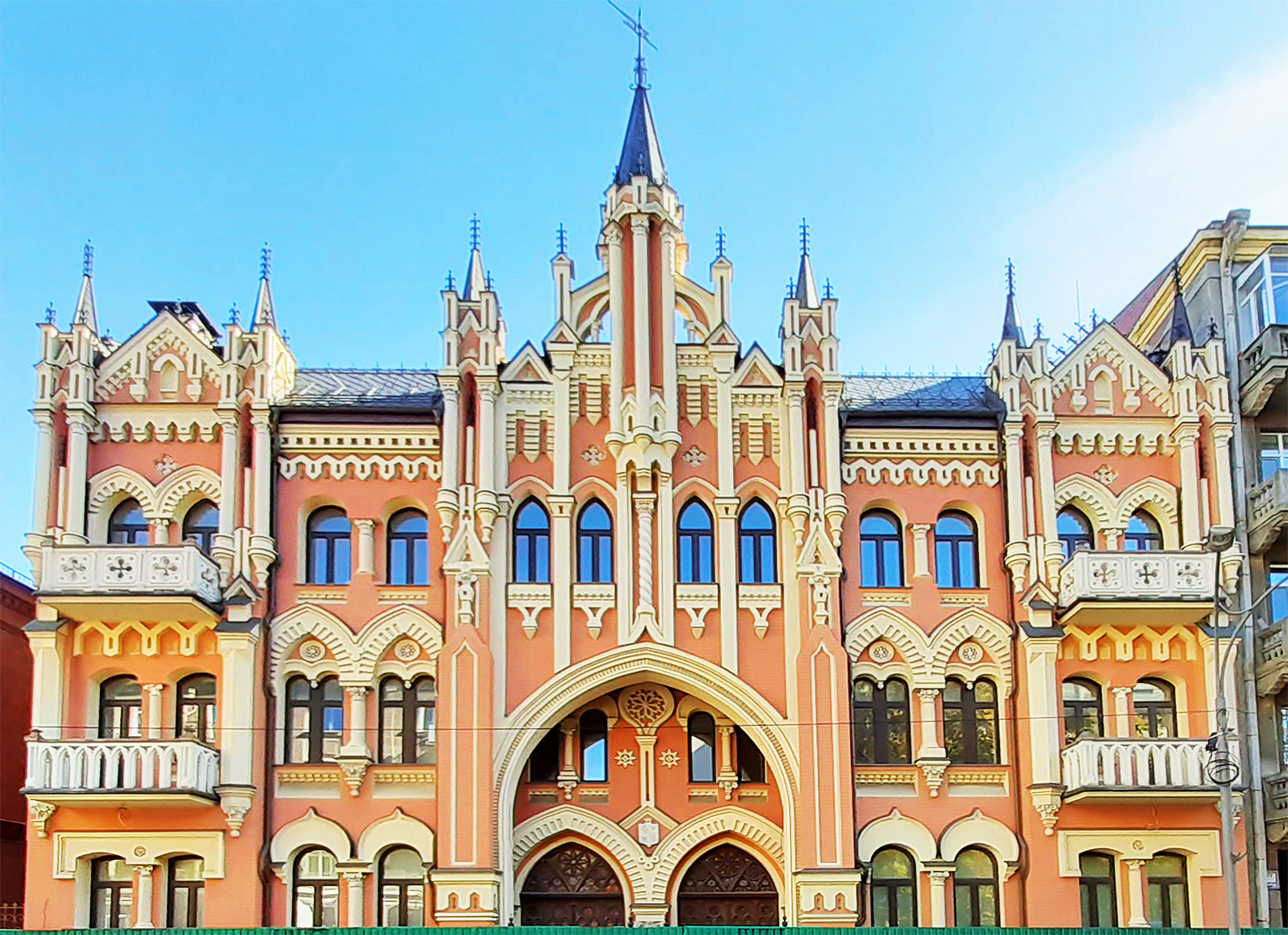 Будинок прибутковий, Київ, Шовковична вул., 19